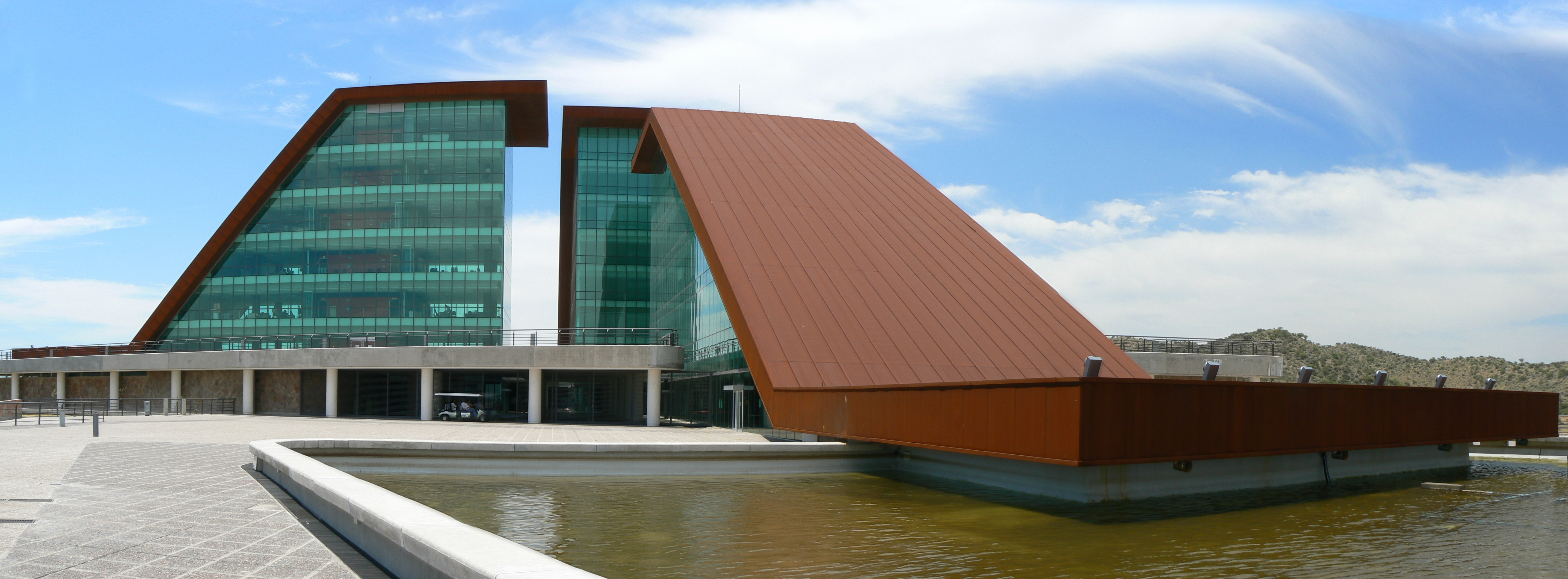 Tres torres principales del edificio de descentralización administrativa “Terrazas del Portezuelo”, San Luis, Argentina